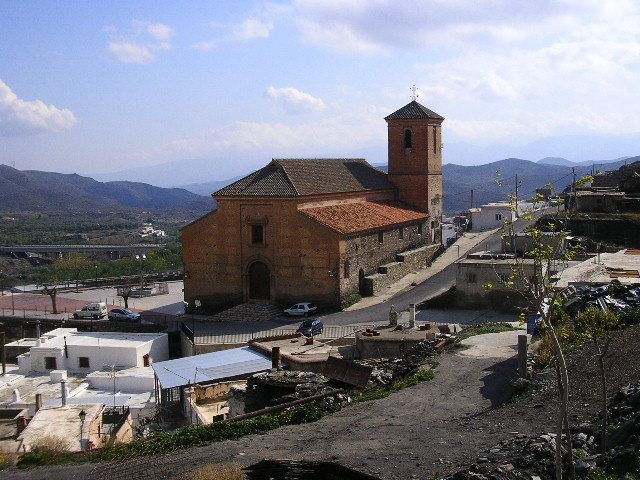 Iglesia de Gérgal